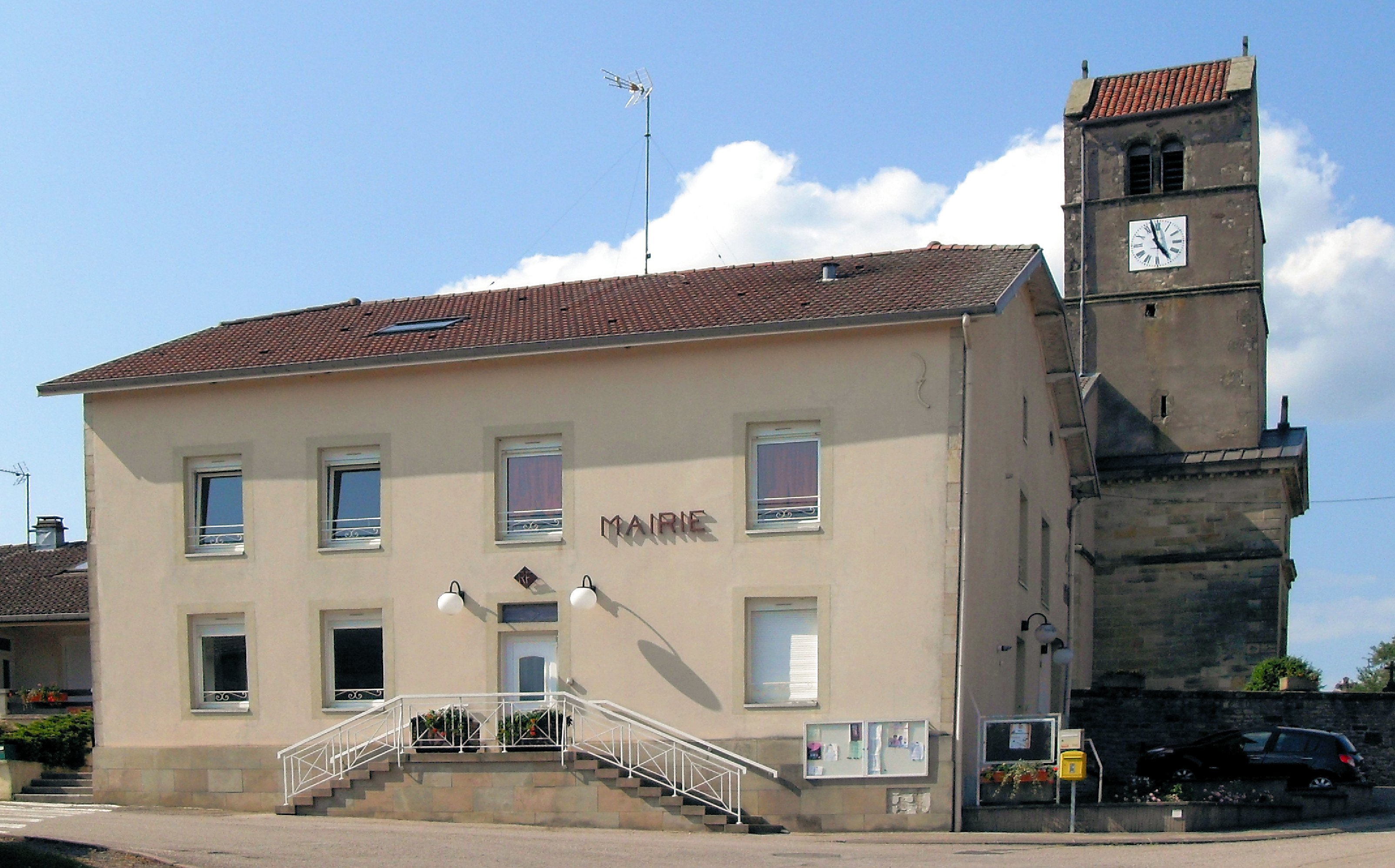 La mairie de Dompierre